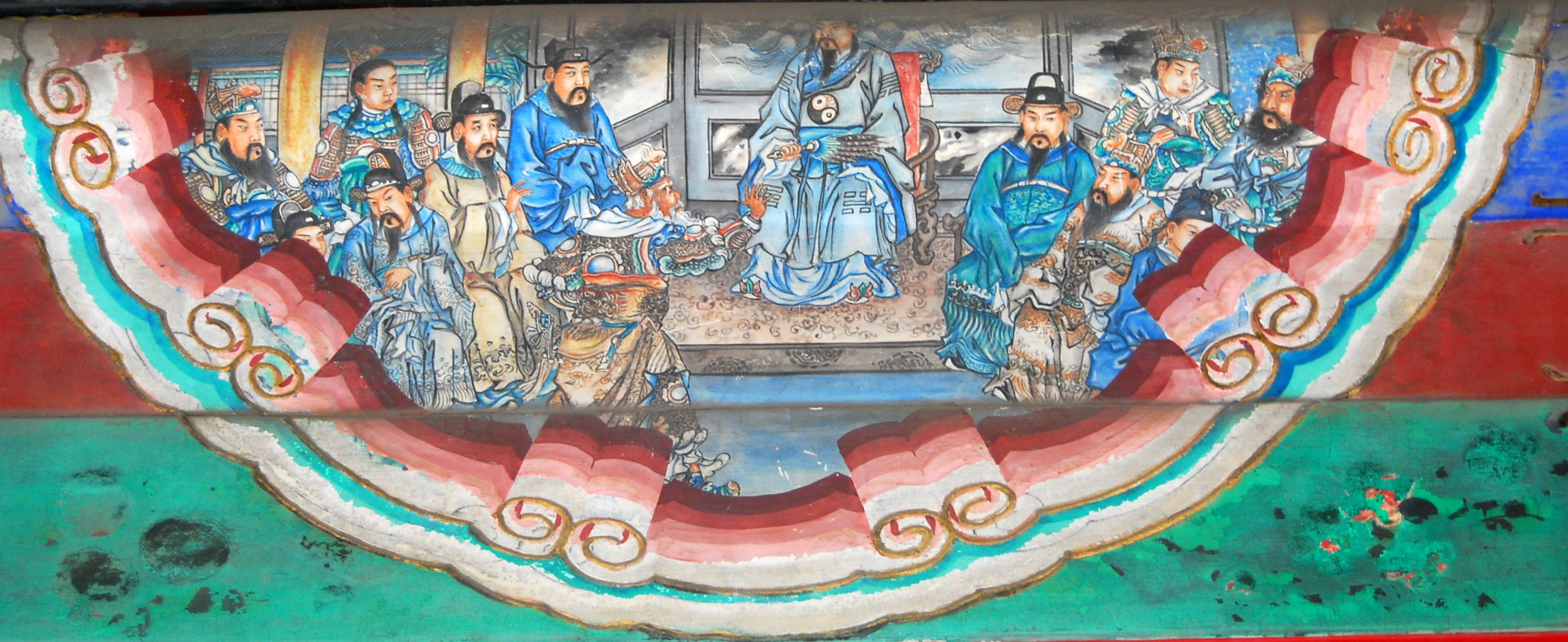 Hoàng Trung thỉnh chiến - Trường lang Di Hòa Viên, Bắc Kinh